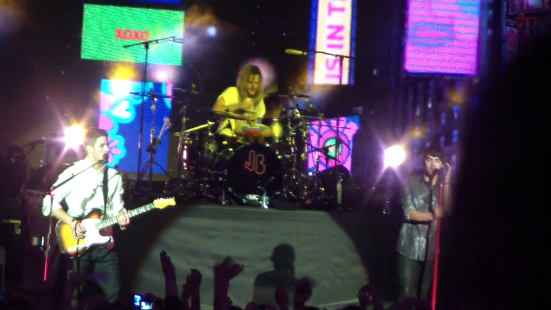 Jonas Brothers Moscow 2012